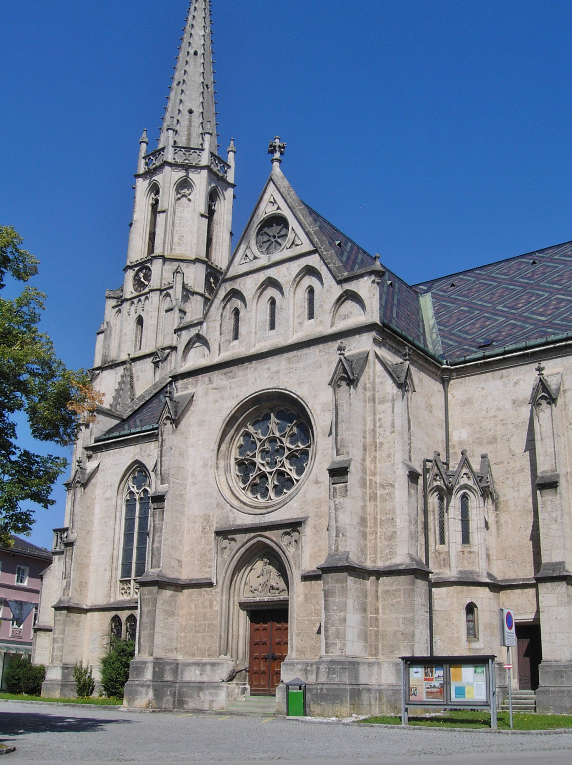 Bad Hall Kath.Pfarrkirche hl.Erlöser Kirchenplatz 5